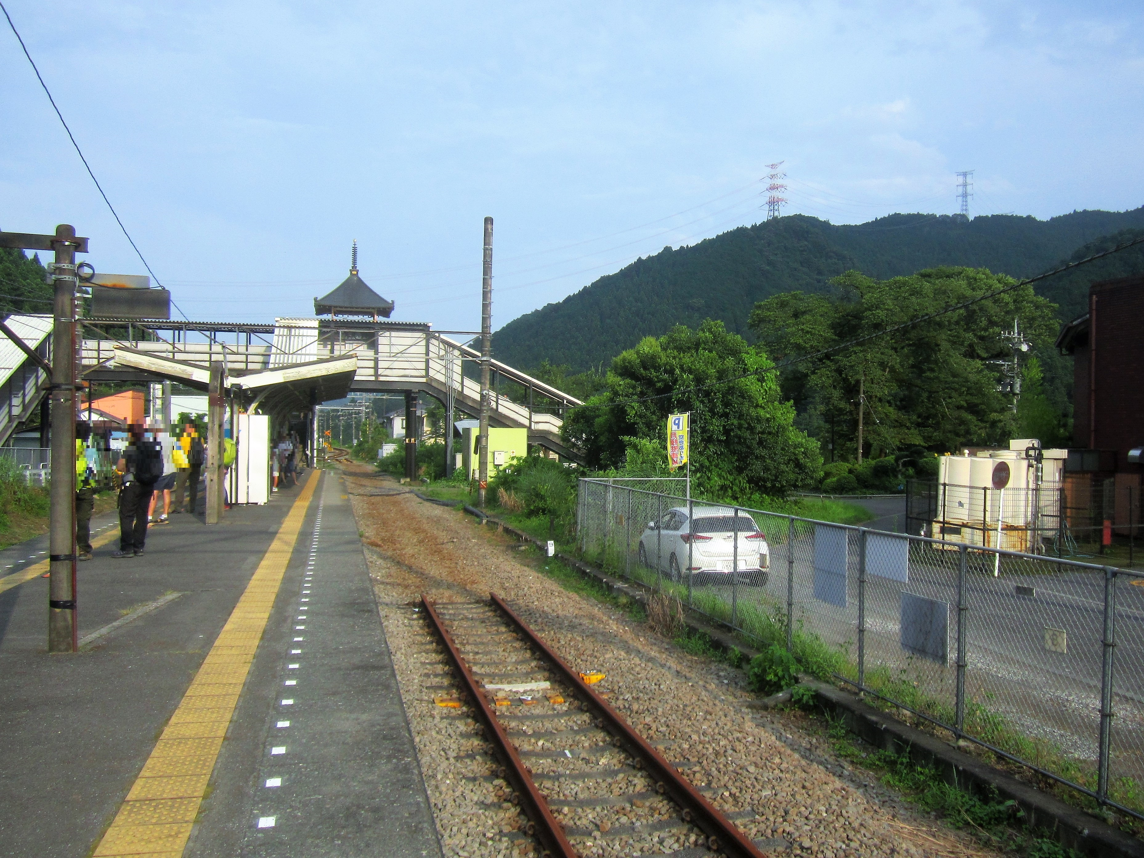 沢井駅ホーム（2020年8月、南口側の線路が撤去されている）